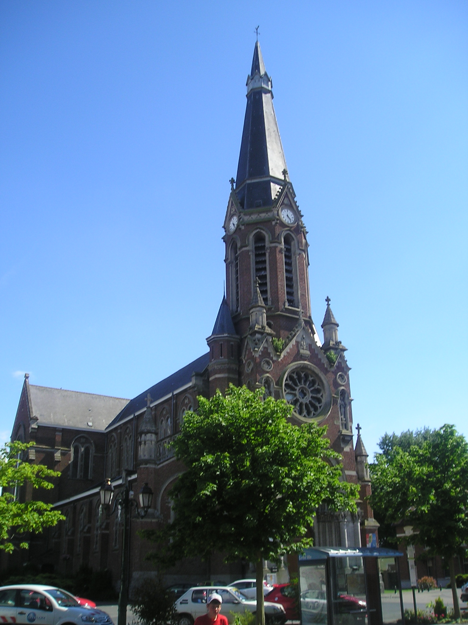 La Gorgue